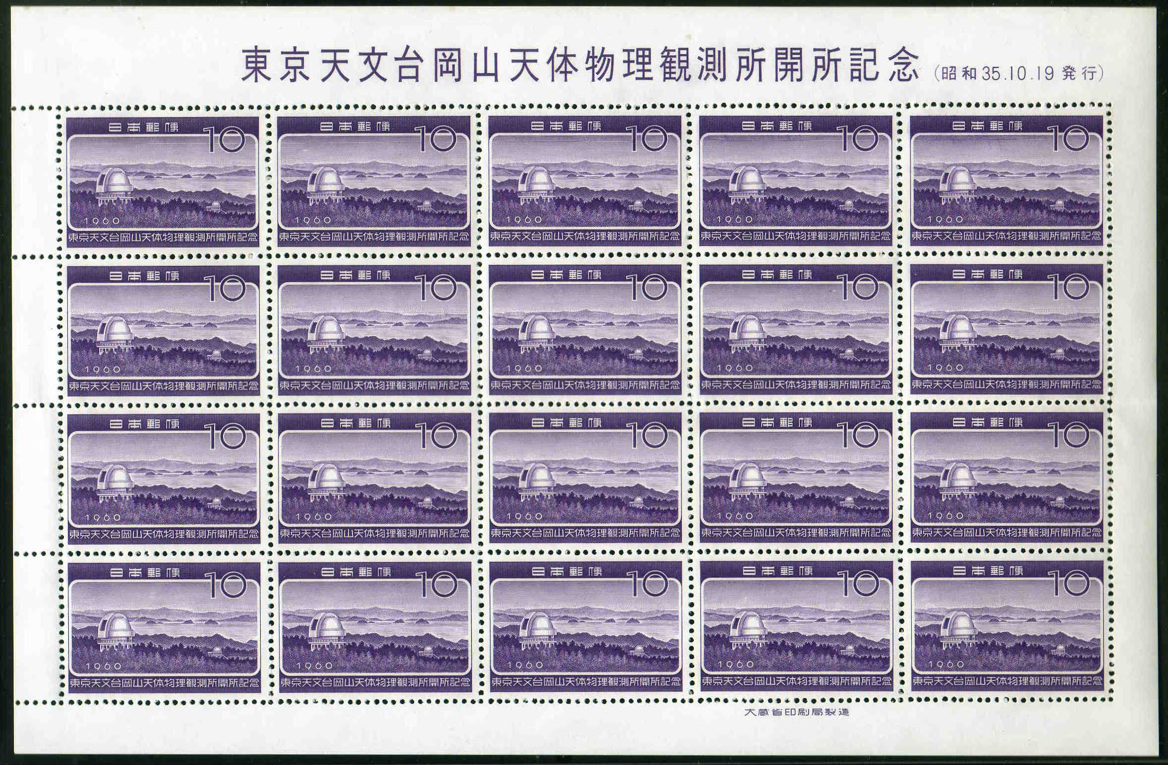 1960年に発行された岡山天体物理観測所開所記念切手の20面シート